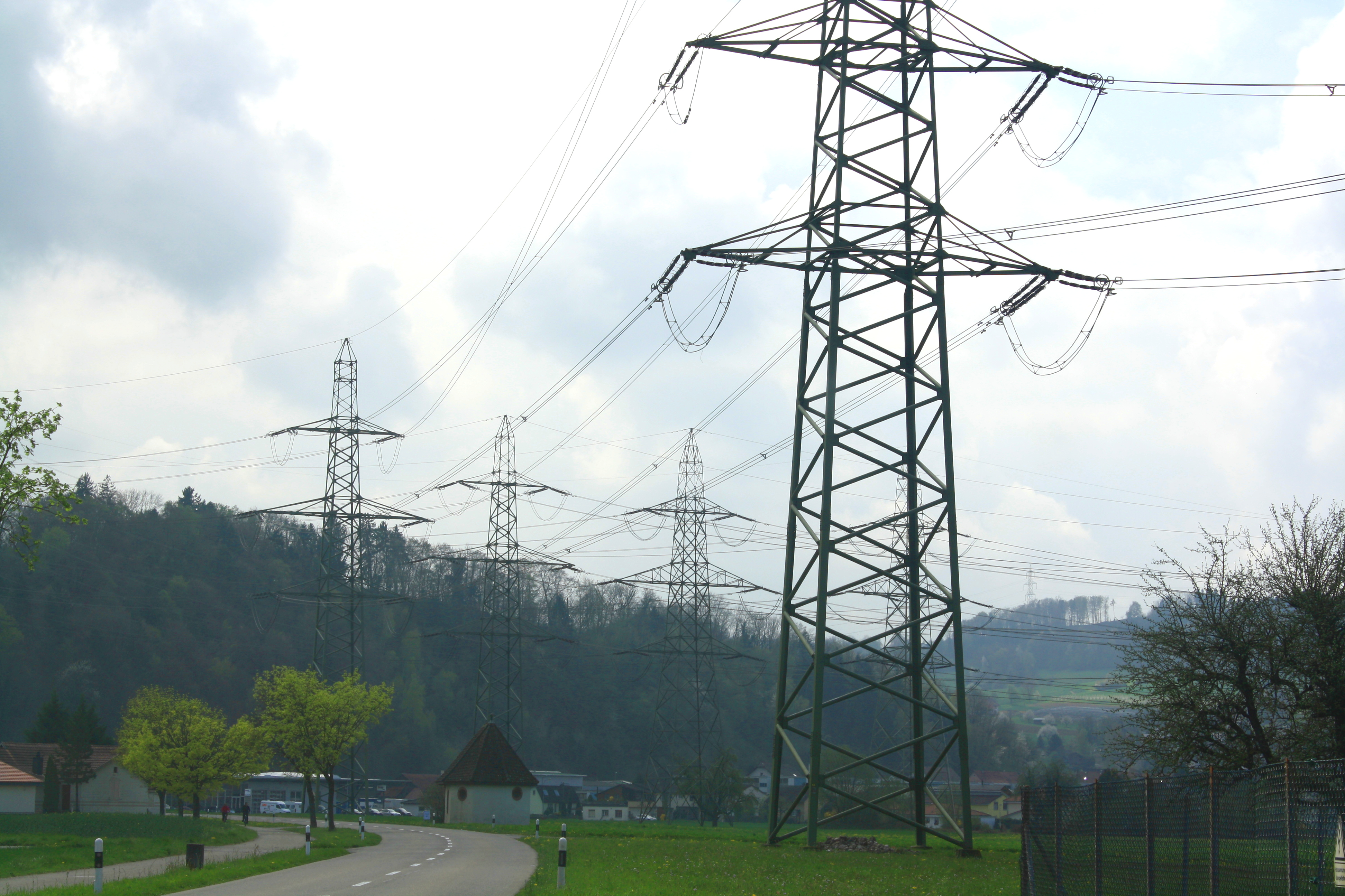 Hochspannungsmasten beim Umspannwerk Laufenburg